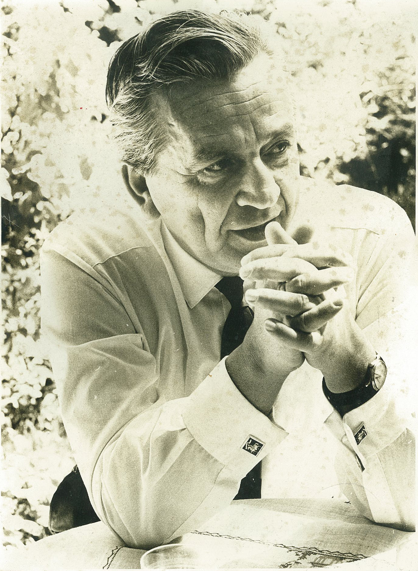 ד"ר פנחס שרשבסקי